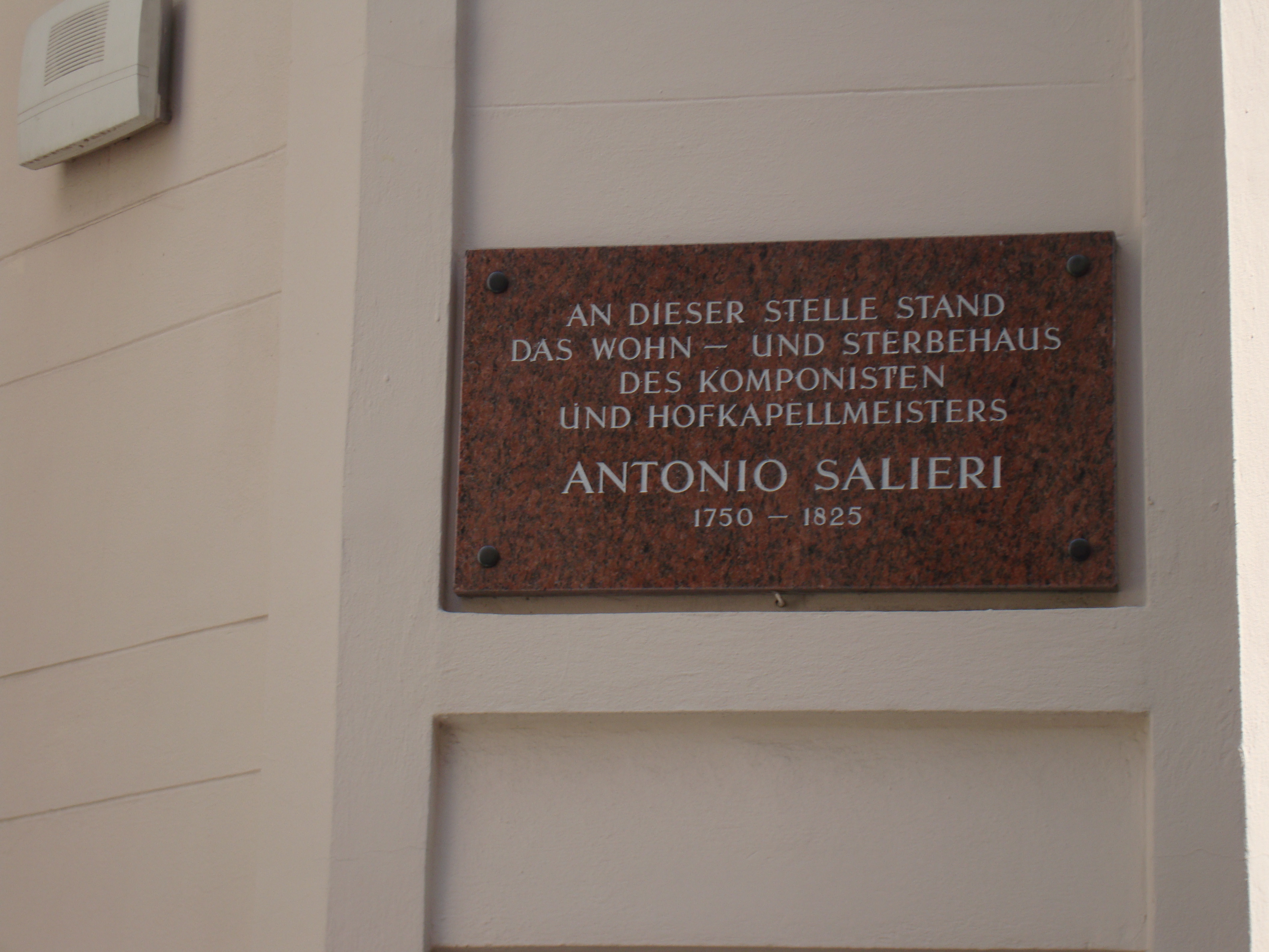 Salieri-Tafel Göttweihergasse